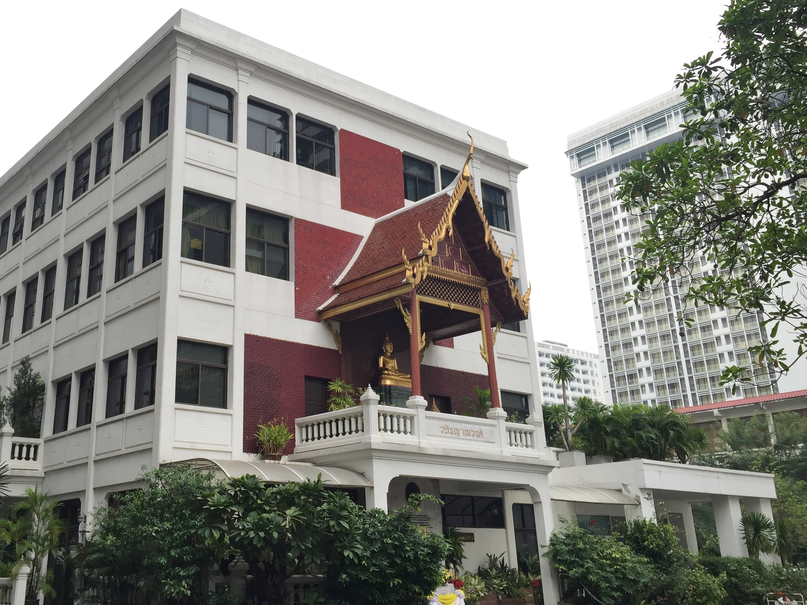 อาคารวชิรญาณวงศ์ โรงพยาบาลจุฬาลงกรณ์ สภากาชาดไทย